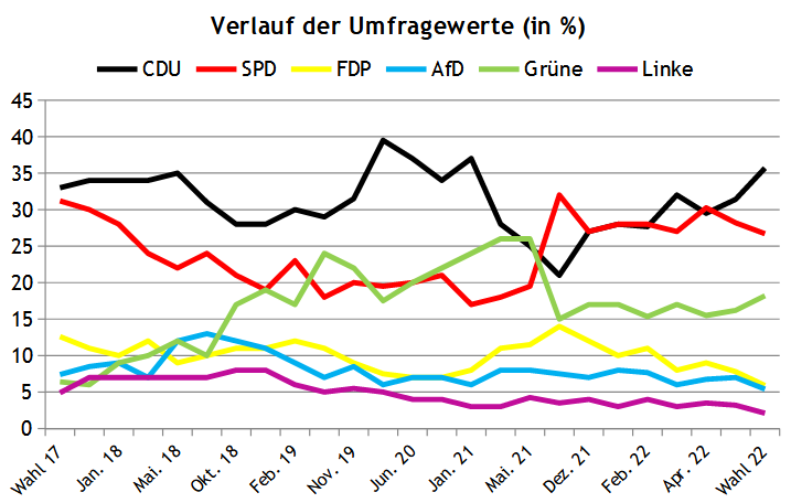 Umfragen zur NRW-Wahl 2022